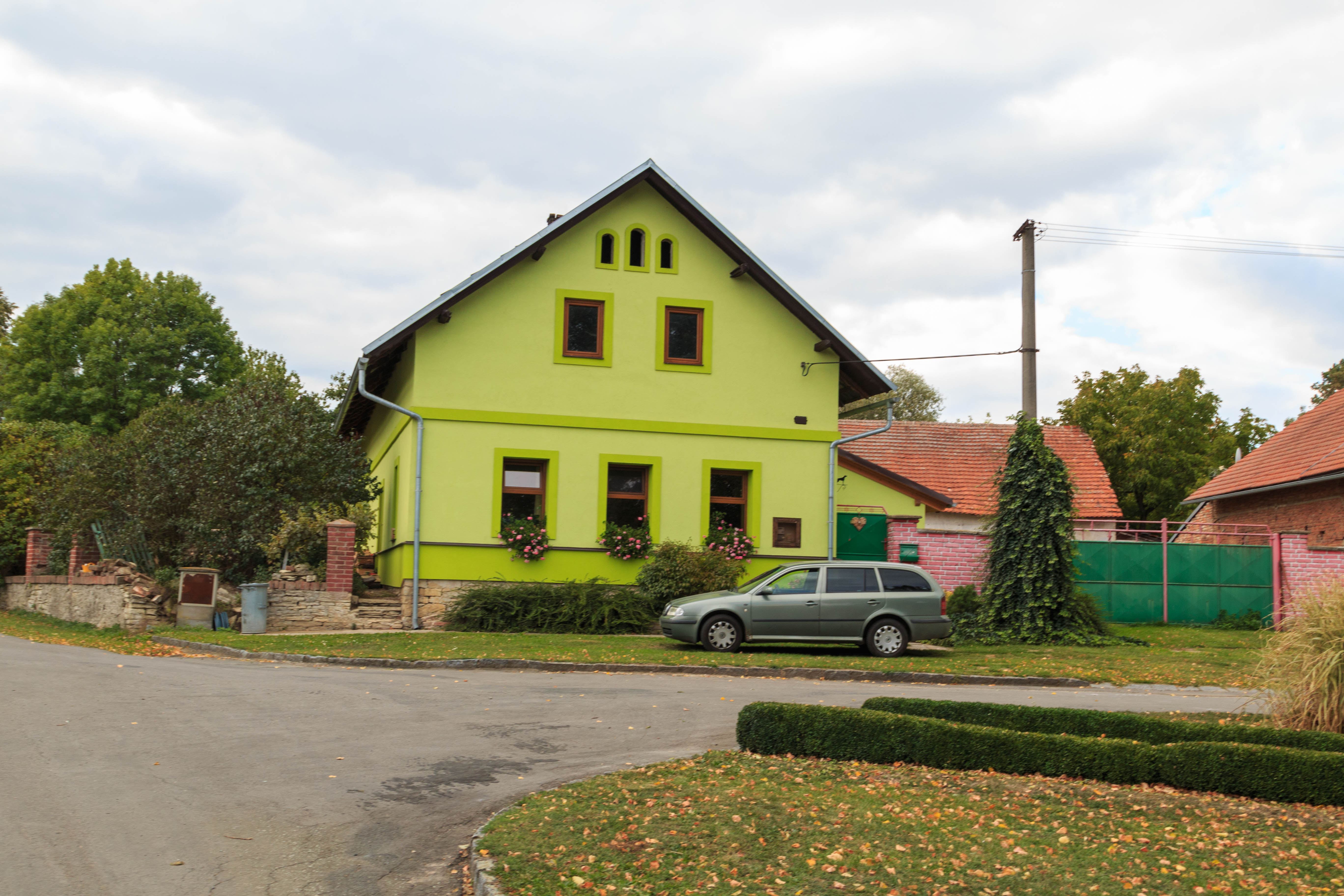 Zalažany č. 30